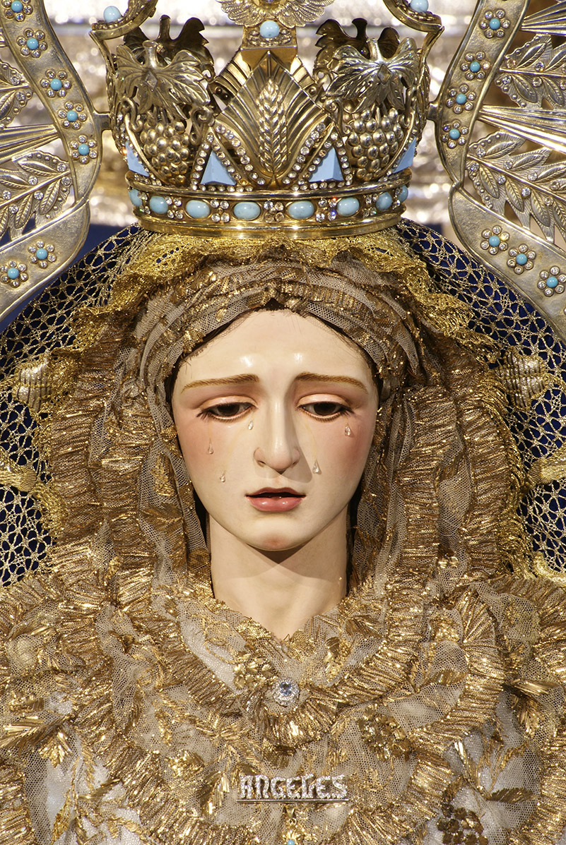 Fotografia realizada por Manuel Francisco Álvarez Ruiz.